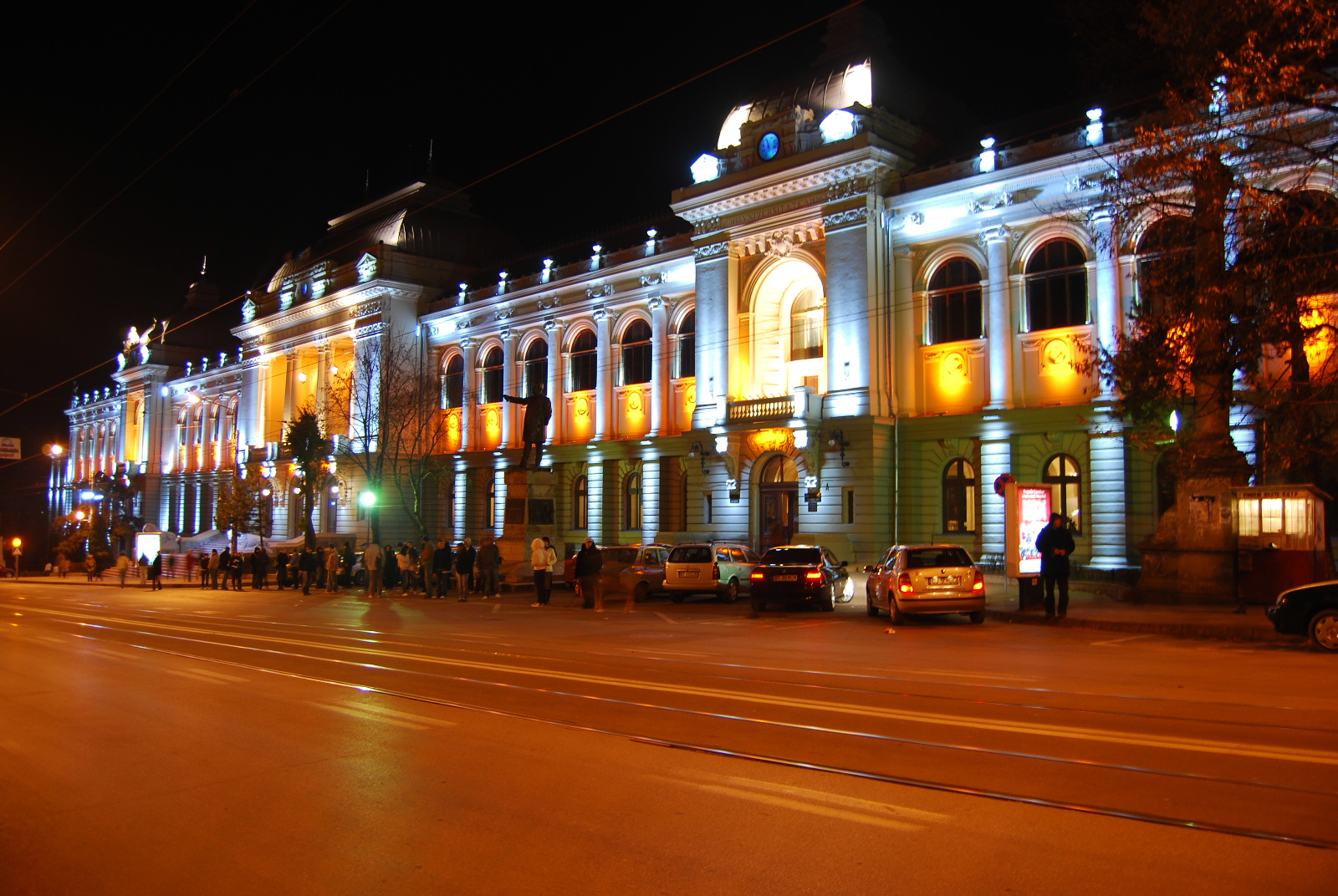 Universitatea "Alexandru Ioan Cuza"